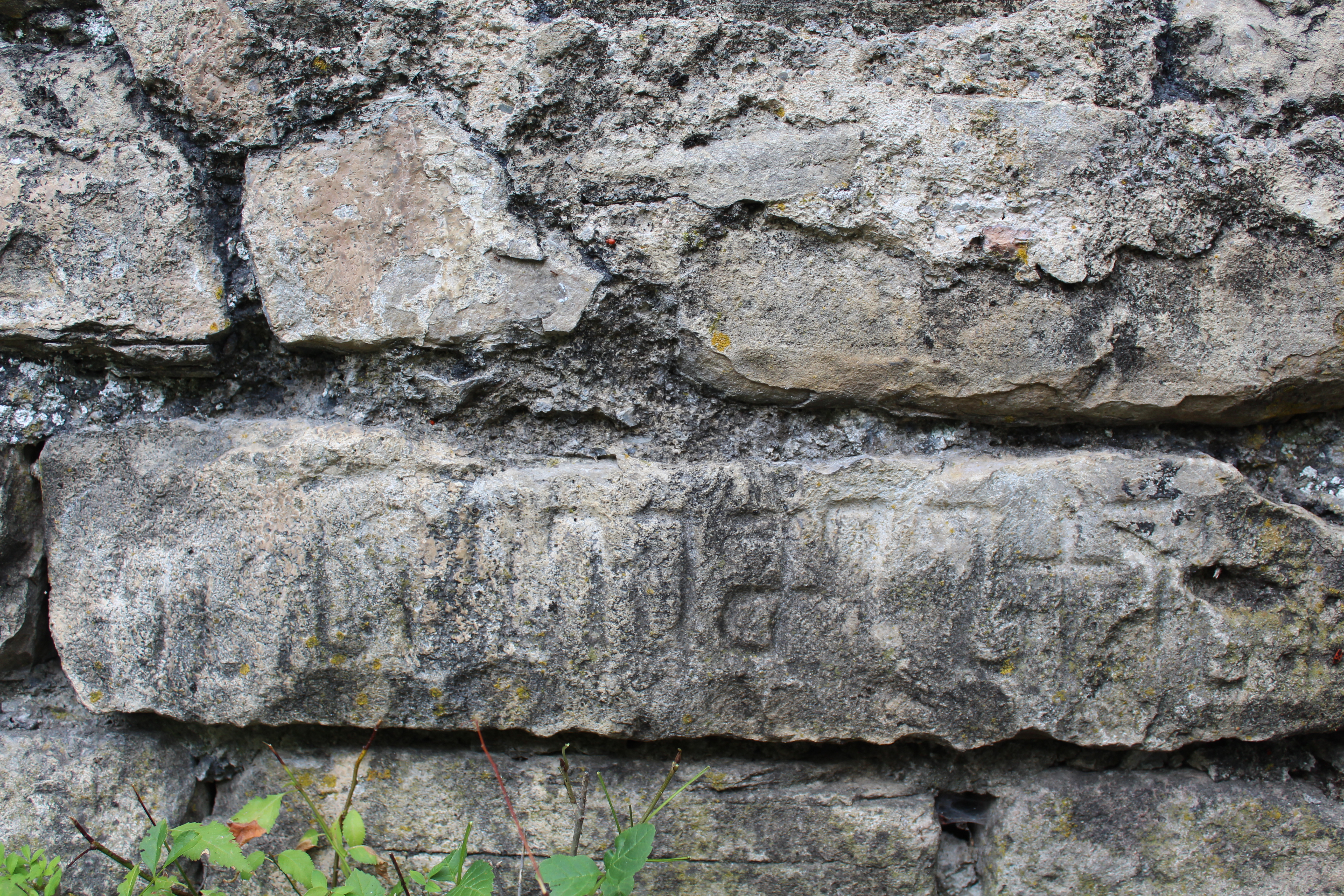 ჭერემის საეპისკოპოსო ტაძრის წარწერა